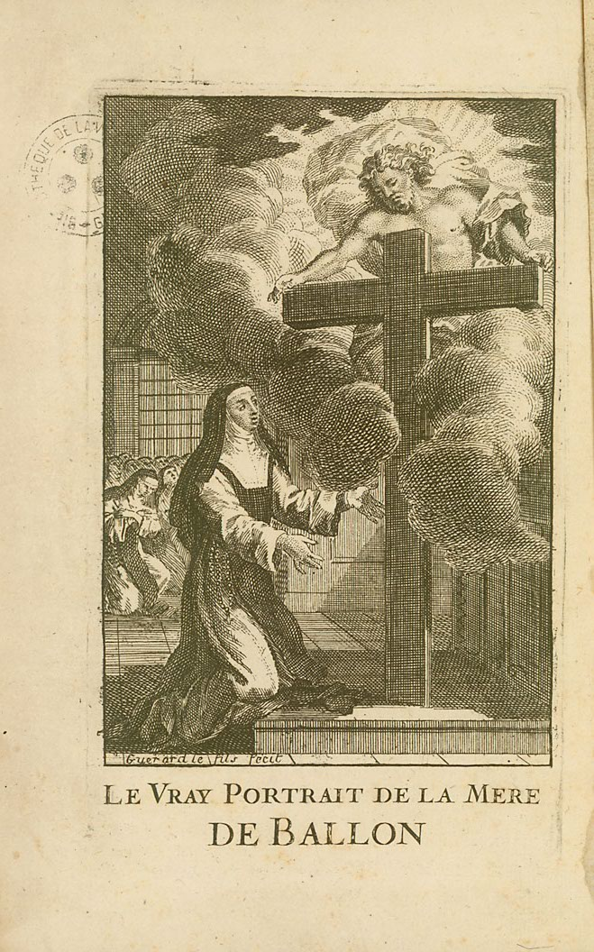 Gravure